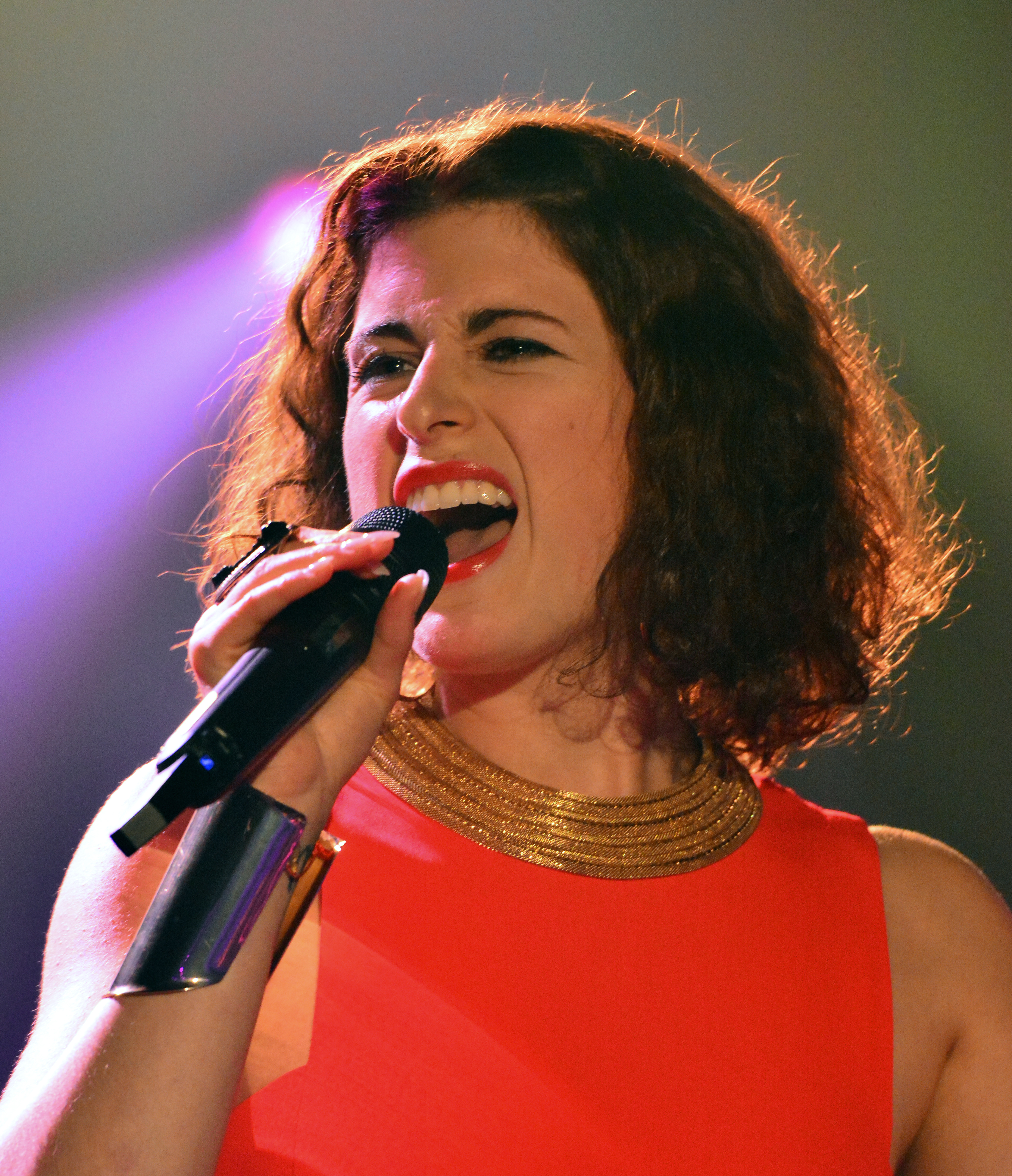 Ann Sophie beim 2. Probentag für das Clubkonzert - Unser Song für Österreich in der „Großen Freiheit 36“ in Hamburg